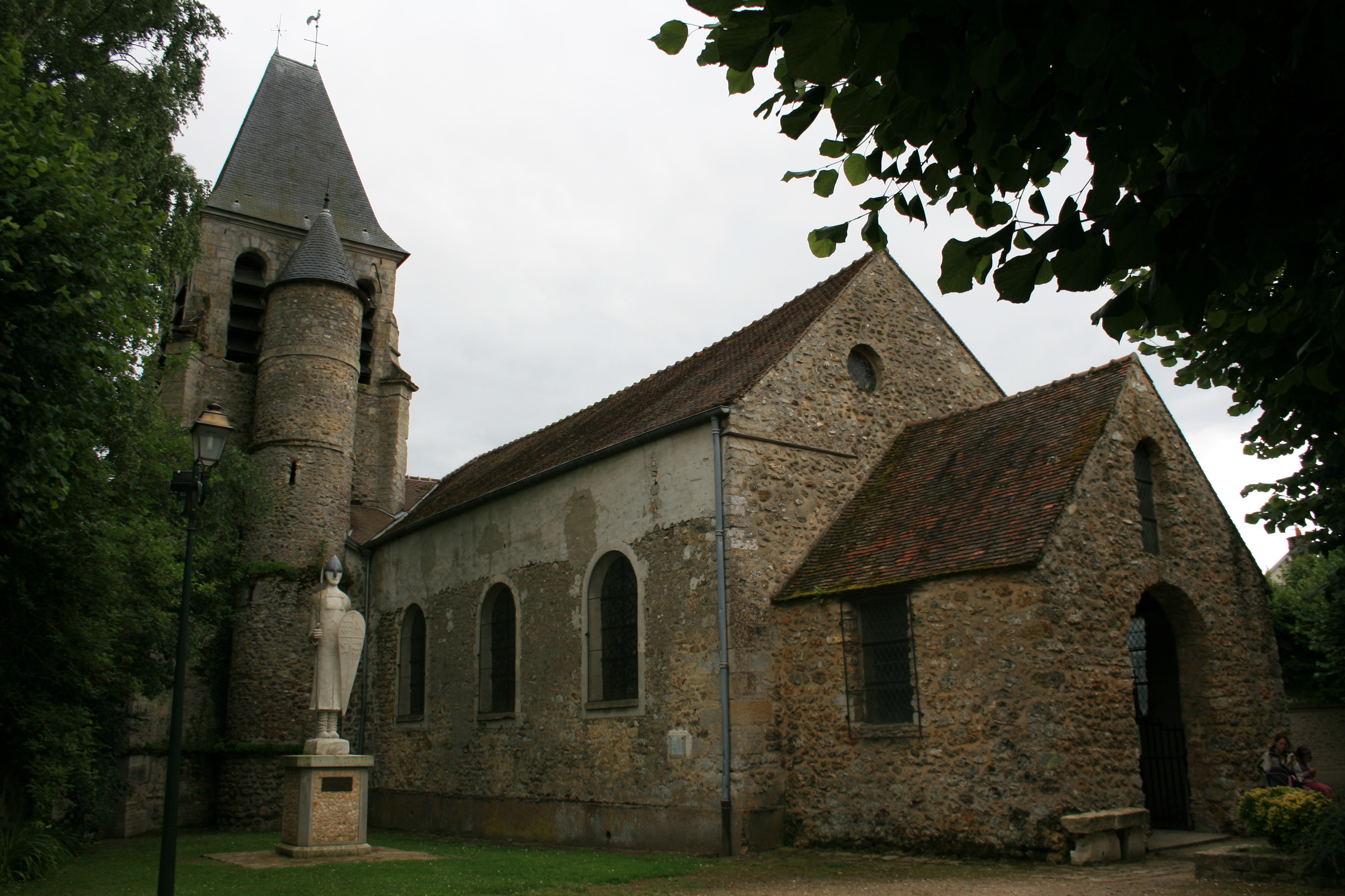 Eglise Saint-Martin d'Aincourt, dans le Val d'Oise. Partie romane du XIIe siècle pour la nef, et du XVIème sicle pour le choeur, le transept, le clocher et la tourelle Unknown church saint-martin, in aincourt, val d'oise, france. nave dates back to the xiith century, transept, chancel and tower to xvith century.